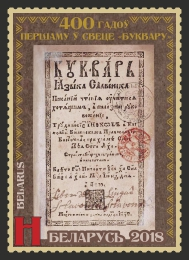 Почтовая марка Республики Беларусь, выпущенная 24 июля 2018 года и посвящённая 400-летнему юбилею первого в мире «Букваря», изданного 24 июля 1618 года типографией Виленского Свято-Духова православного братства в Евье. Художник — Татьяна Кузнецова. Тираж — 48 тыс. экз. Номер по каталогу «Белпочты» — 1268.